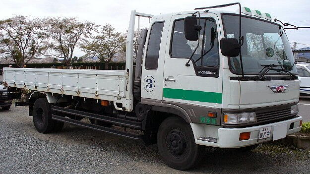 日野・レンジャー（4代目・教習車仕様）